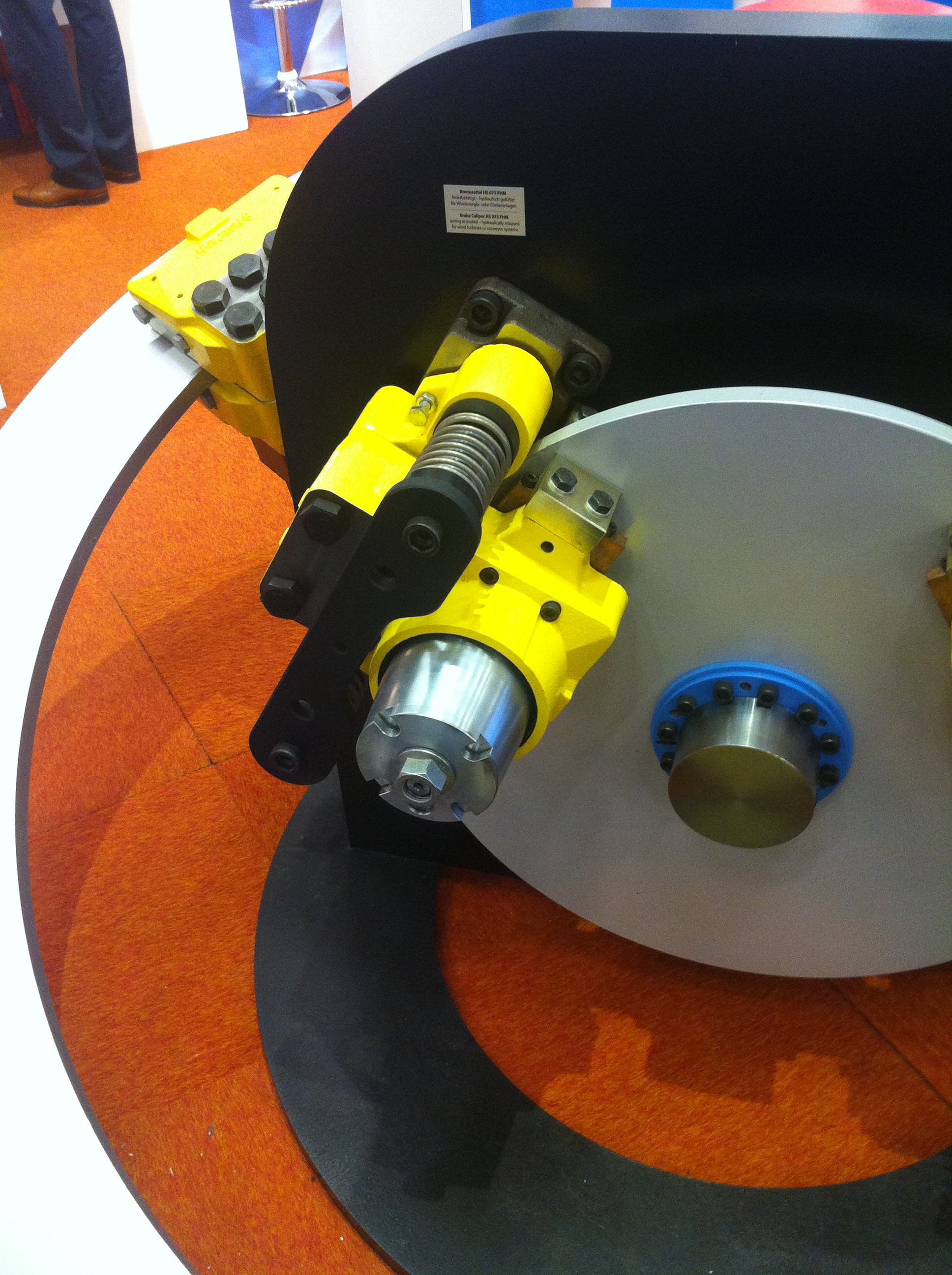 Brake Caliper Make Ringspann